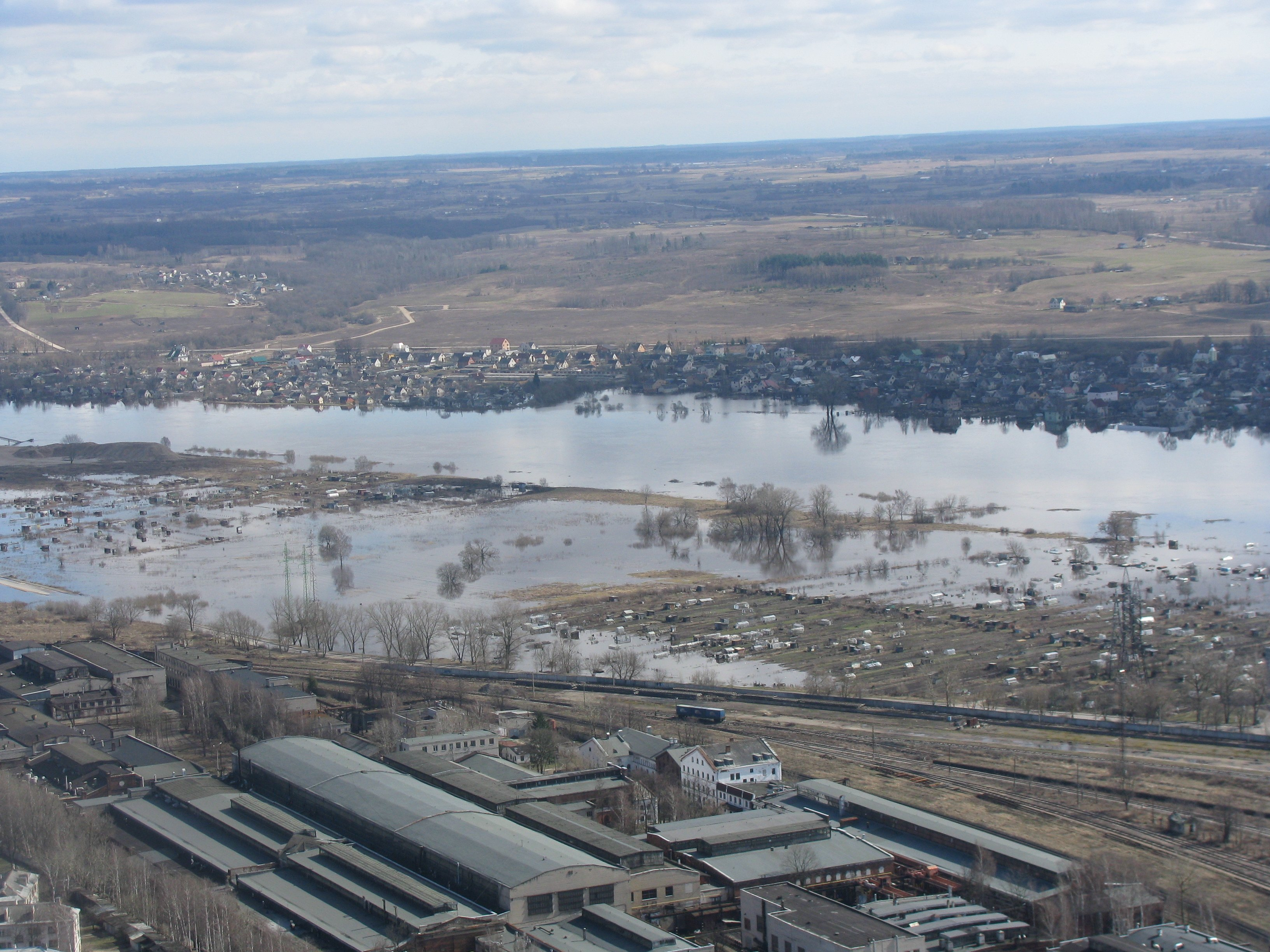 Gajoks un Judovka